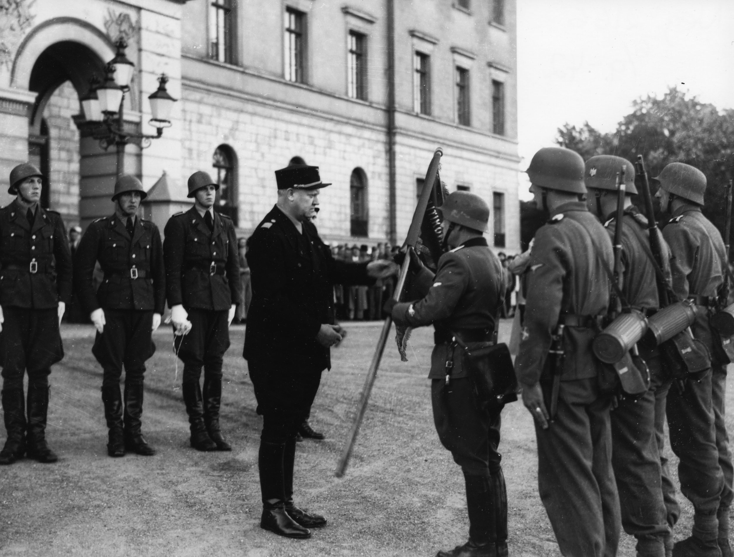 1942/10/01. RA/PA-1209/Ue 97/ (img116)